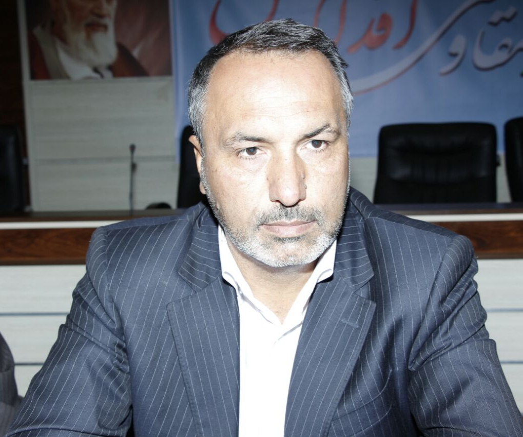 دکتر محمدرضا رضایی کوچی نماینده جهرم و خفر در مجلس شورای اسلامی